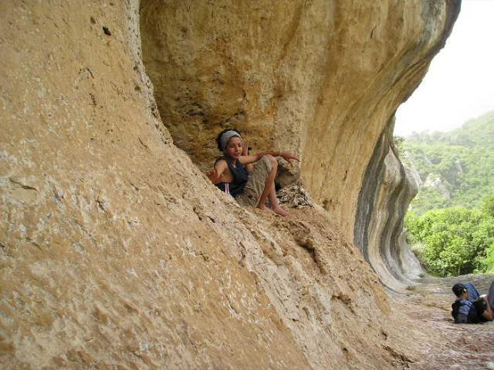 מראה מקום המשלב סלע כורכר וצמחיה סבוכה.